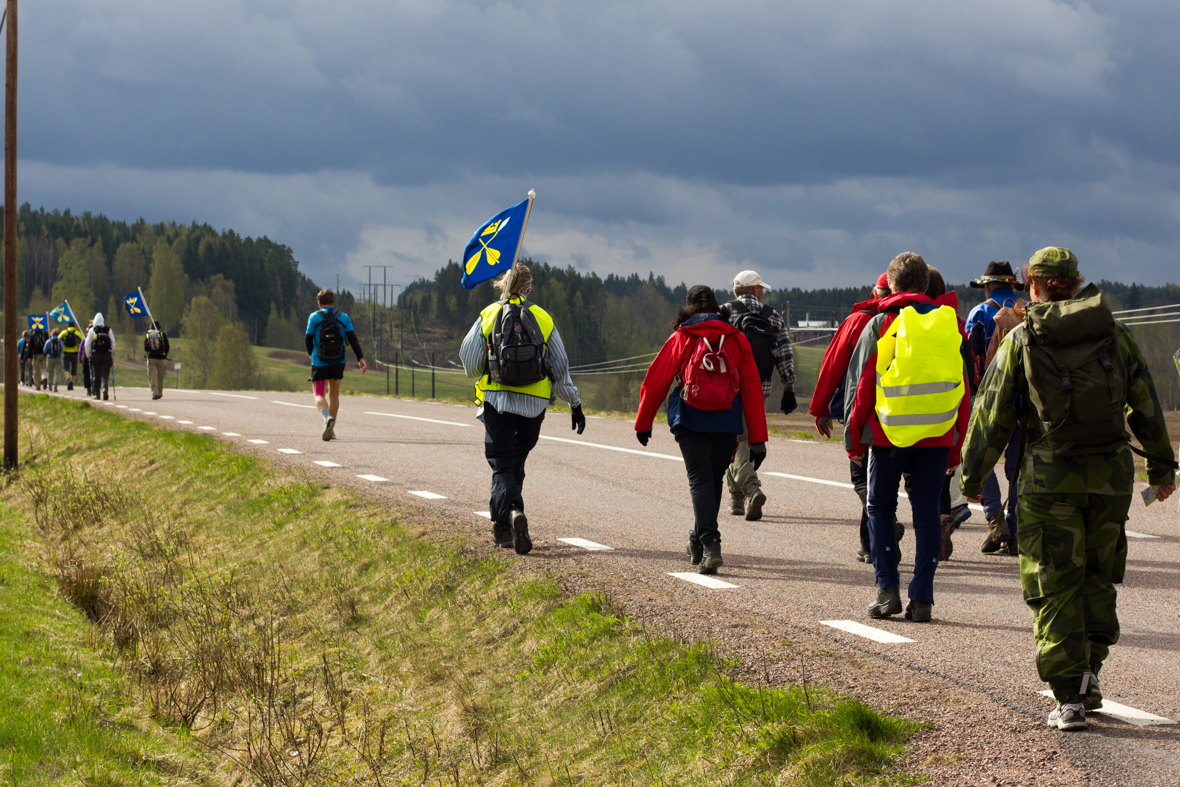 Vandring i Karlfeldts spår, en tredagarsvandring på cirka 77 km, en alternativ sträckning av Dalkarlsvägen, delvis sammanfallande. Den bygger på den väg dalkarlarna från Gagnef och Tuna tog, som sedan anslöt till vägen karlarna från exempelvis Mora och Falun tog, men istället för att gå över Folkärna och vidare mot Stockholm var målet Tolvmansgården i Karlbo.